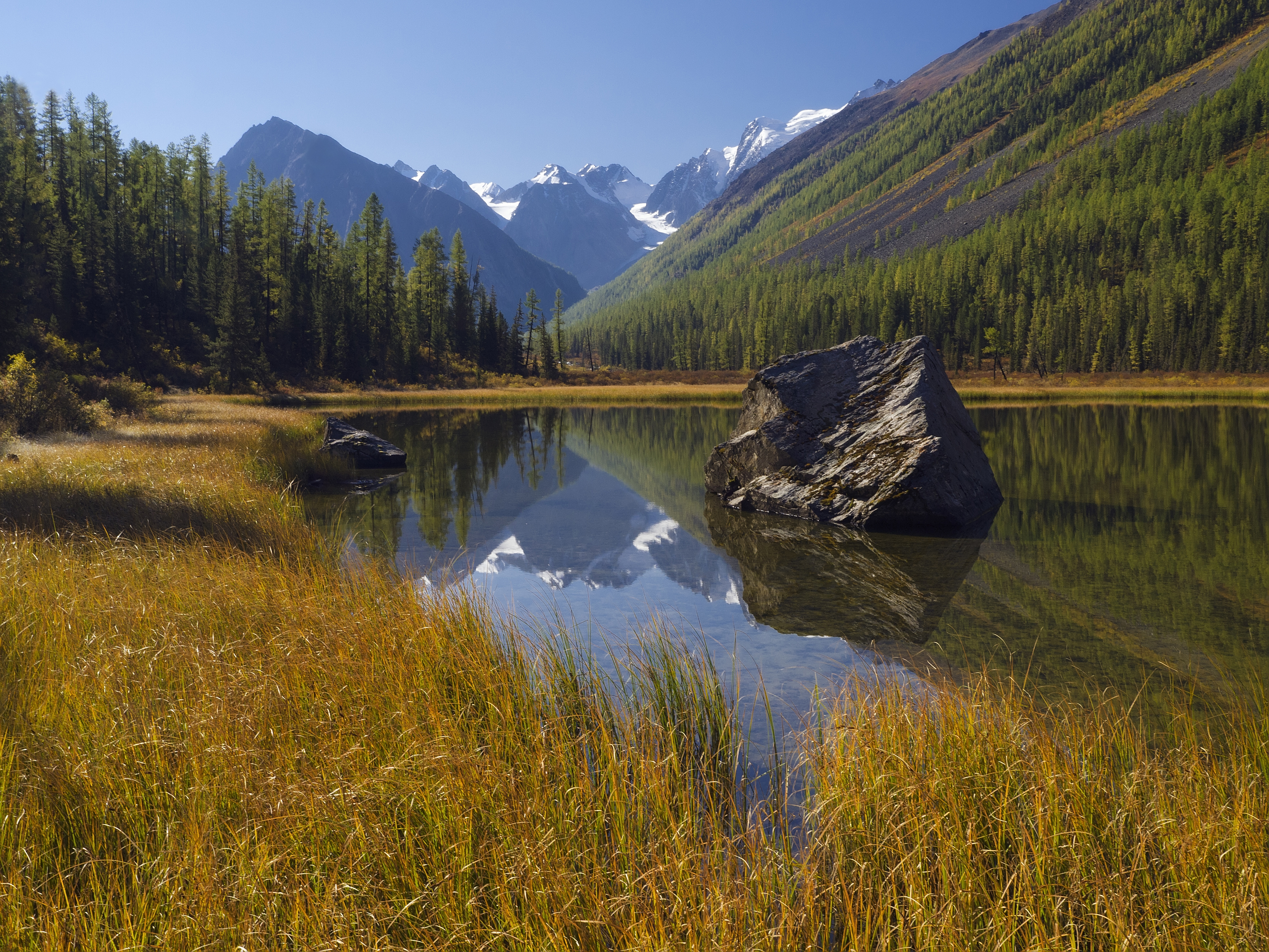 Горный Алтай, долина река Шавла This image is related to the protected area of Russia number 0410008